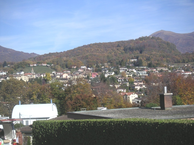 Veduta di Comano, Svizzera, nel 2005 fotografia scattata l'8 novembre 2005 da Fernando Pescia.